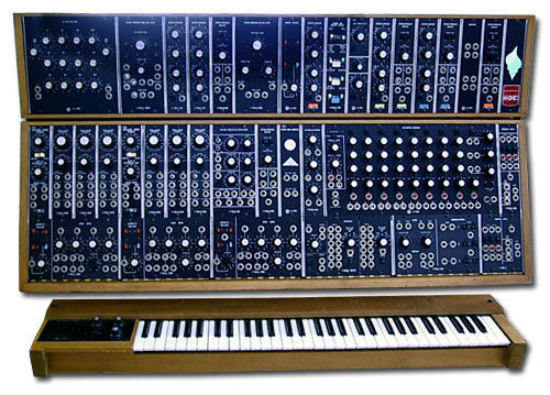 Sintetizzatore Moog Modular 55